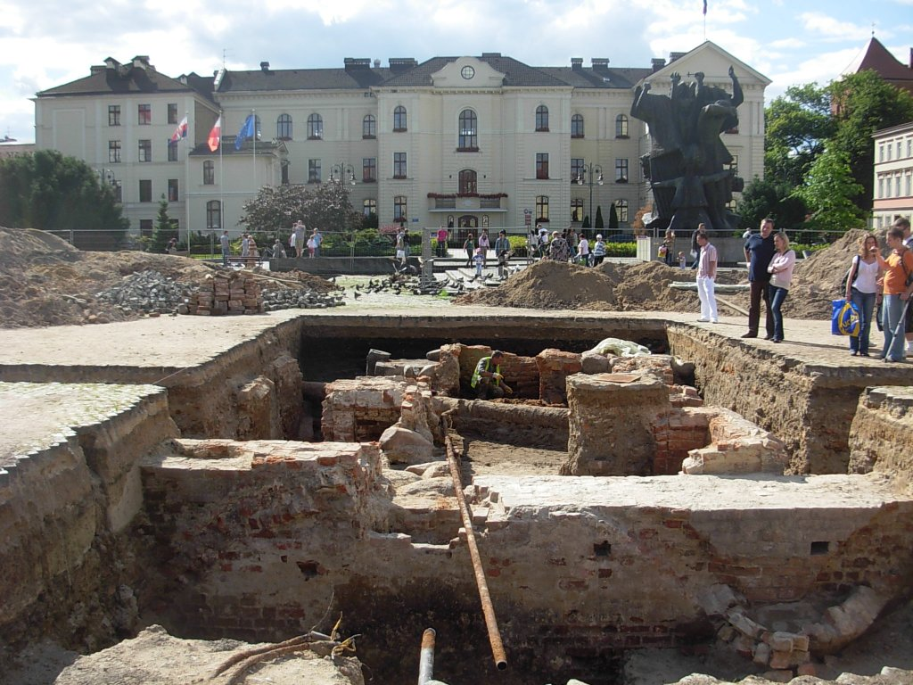 Odkryte fundamenty starego ratusza na Starym Rynku w Bydgoszczy